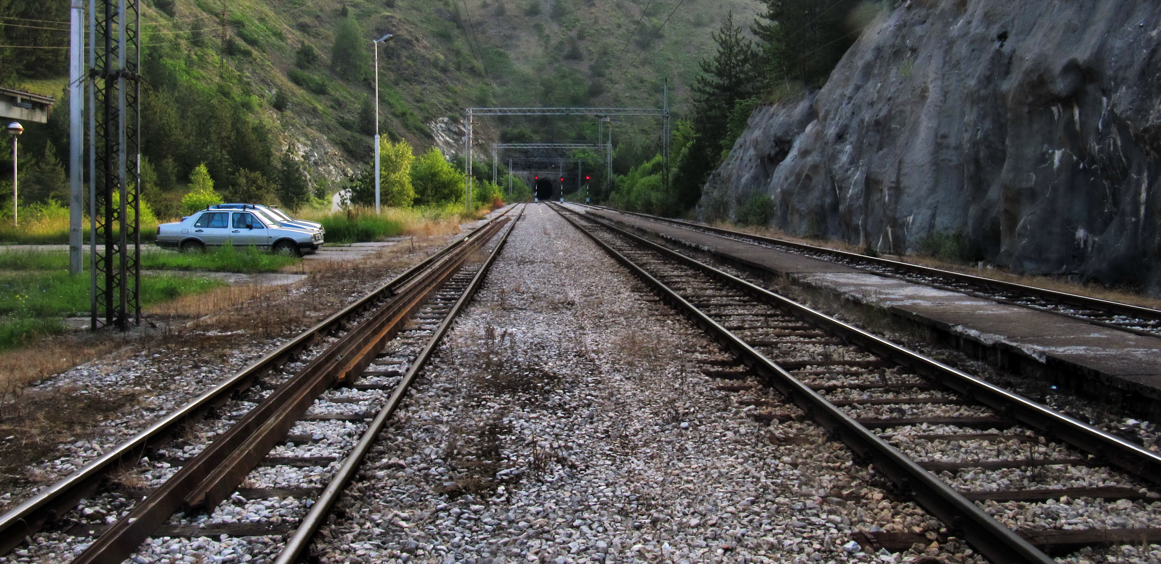 Zlatibor - železnička stanica